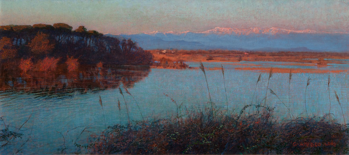 Lago di Massaciuccoli, olio su tela, Pinacoteca Fondazione Cassa di Risparmio di Tortona